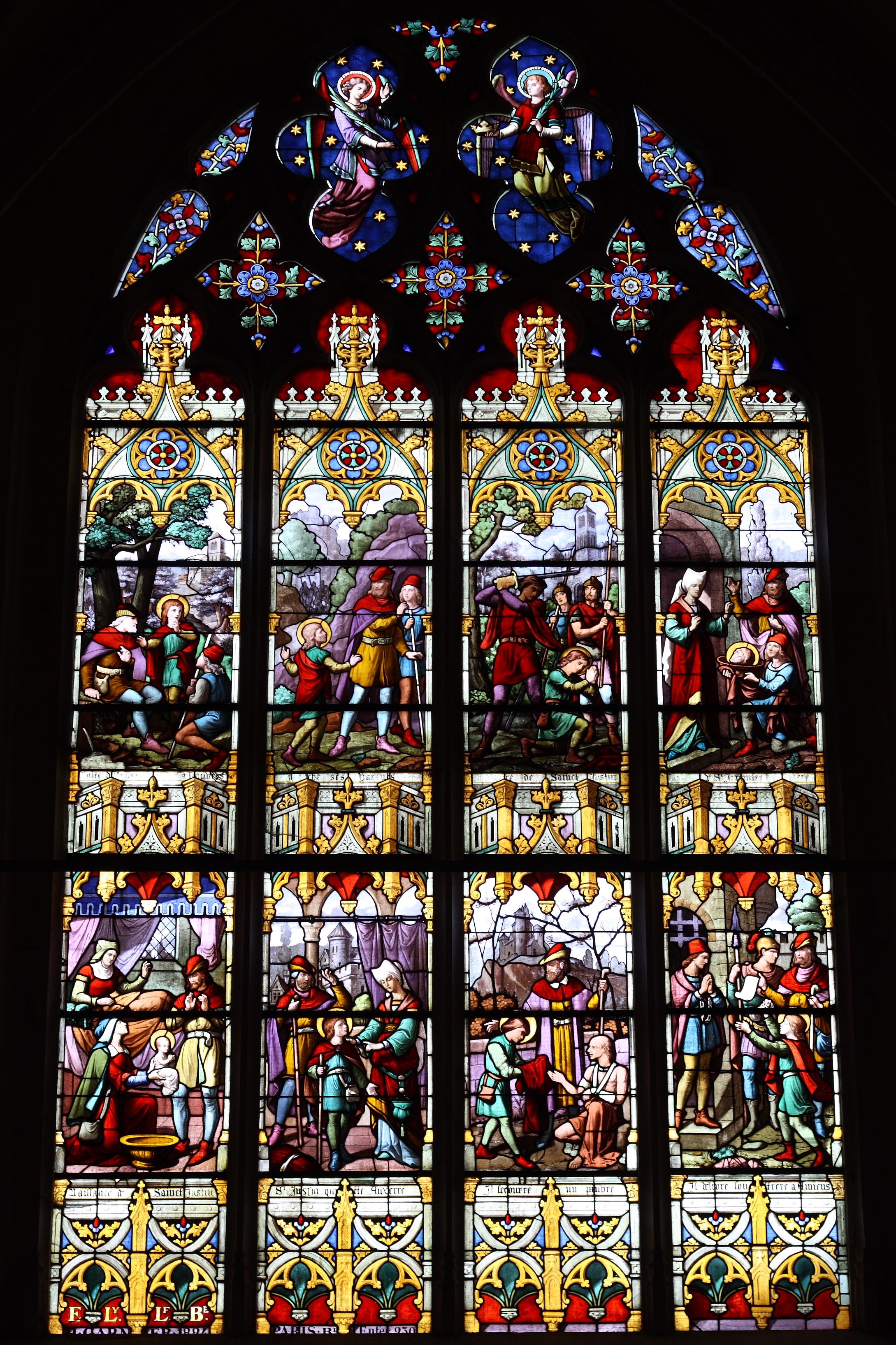 Bleiglasfenster in der katholischen Pfarrkirche Saint-Justin in Louvres, Darstellung: Szenen aus dem Leben des hl. Justin